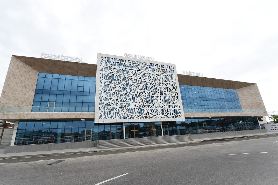 Sabunçu dəmiryolu vağzalı yenidən qurulmadan sonra